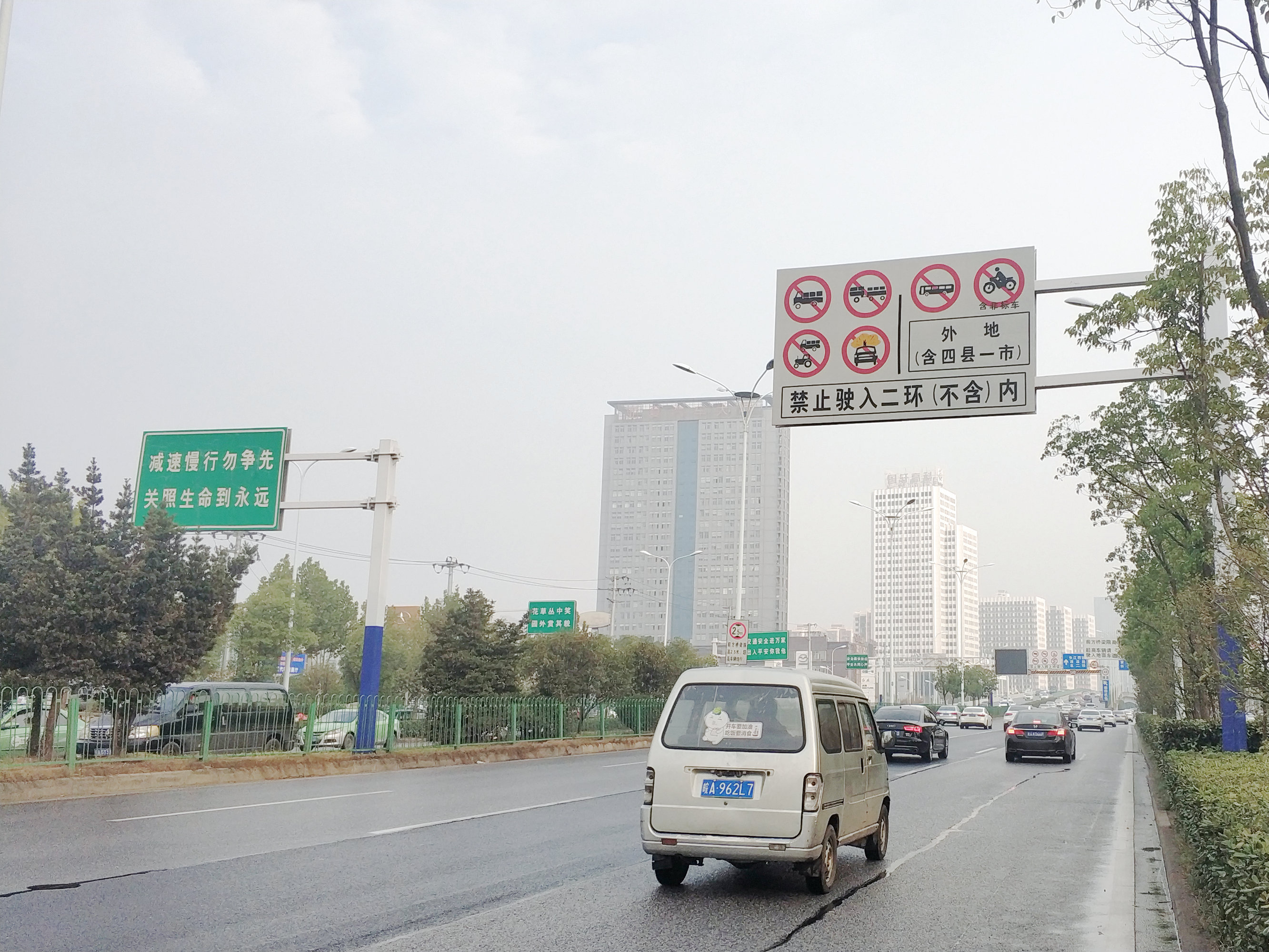 安徽省合肥市二环内禁摩托车路标的公示牌